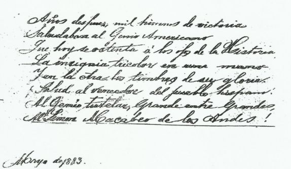 Estrofa del poema escrito por el General Eduardo Pérez Fabelo, al libertador de Hispanoamérica Simón Bolívar. Original de puño y letra de Pérez Fabelo.